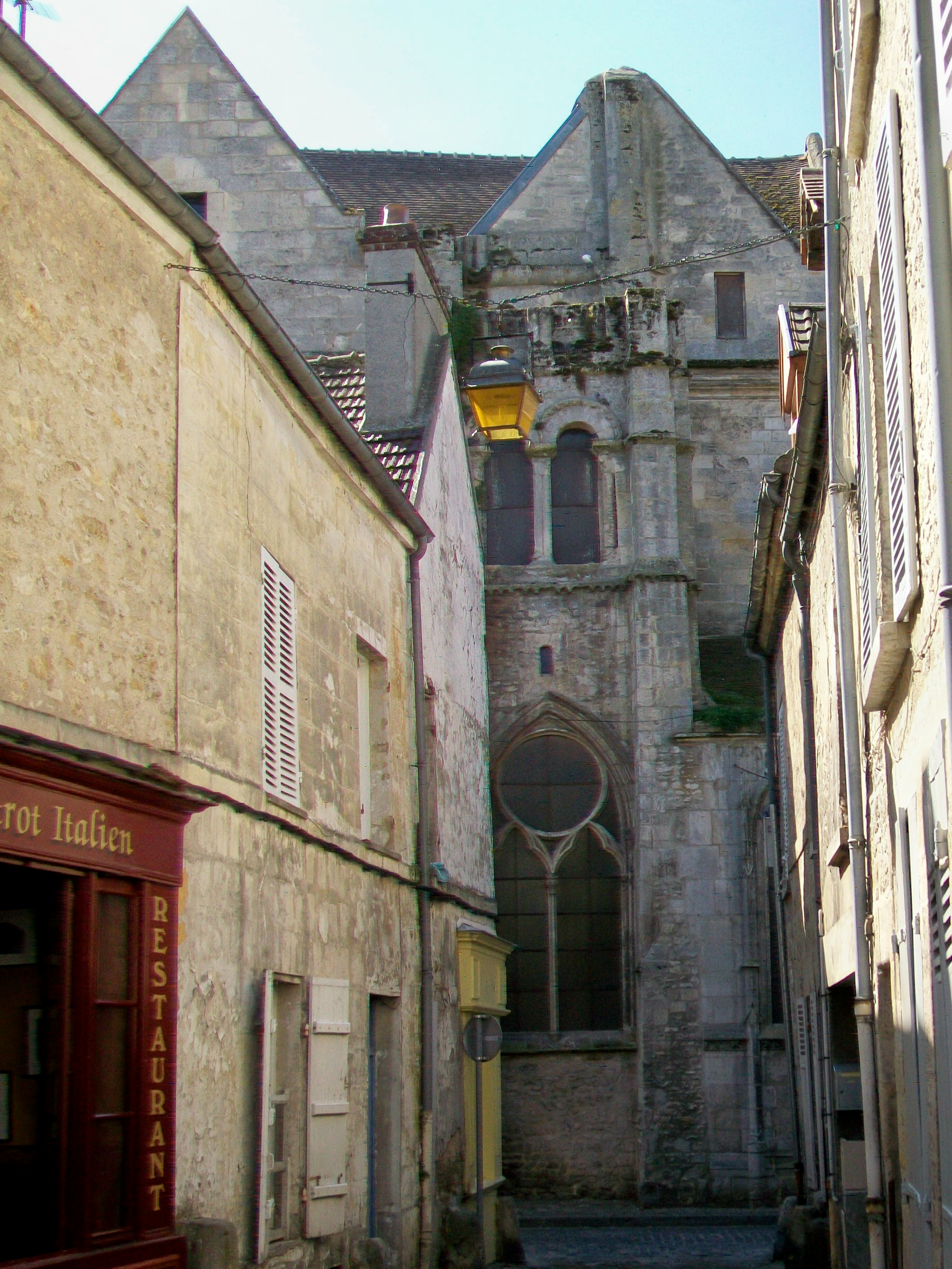 Vue partielle de la façade nord depuis l'étroite rue du Four.